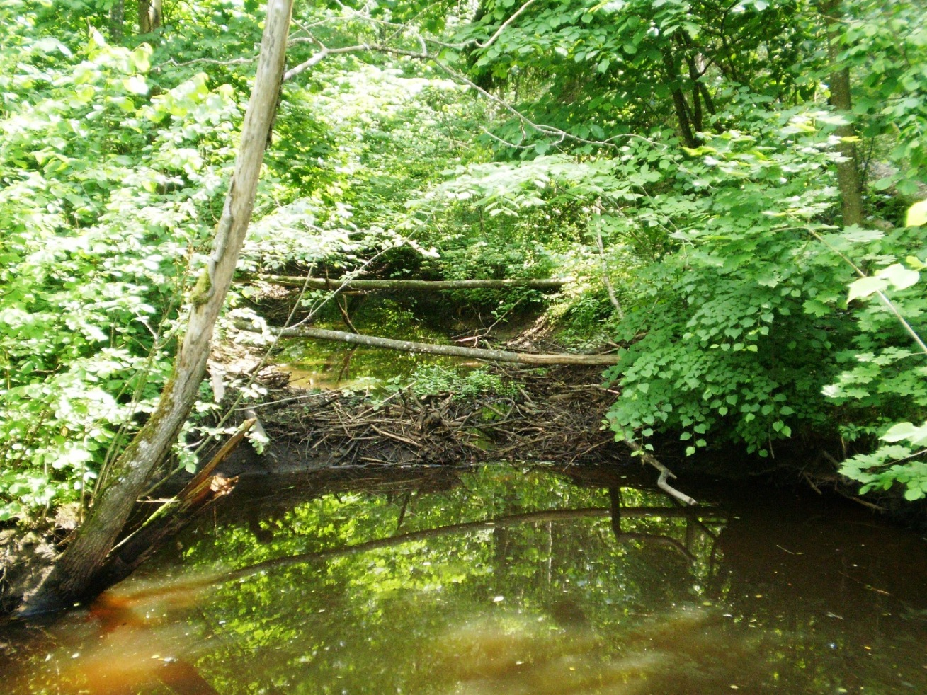 Smilga Josvainių miške, netoli Palainiškių